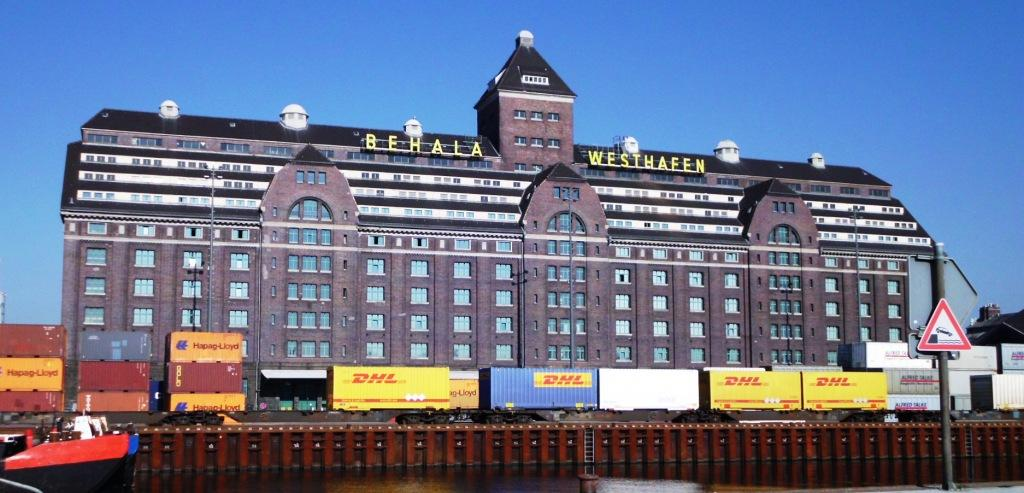 Berlin Westhafen, Lagerhaus der Behala